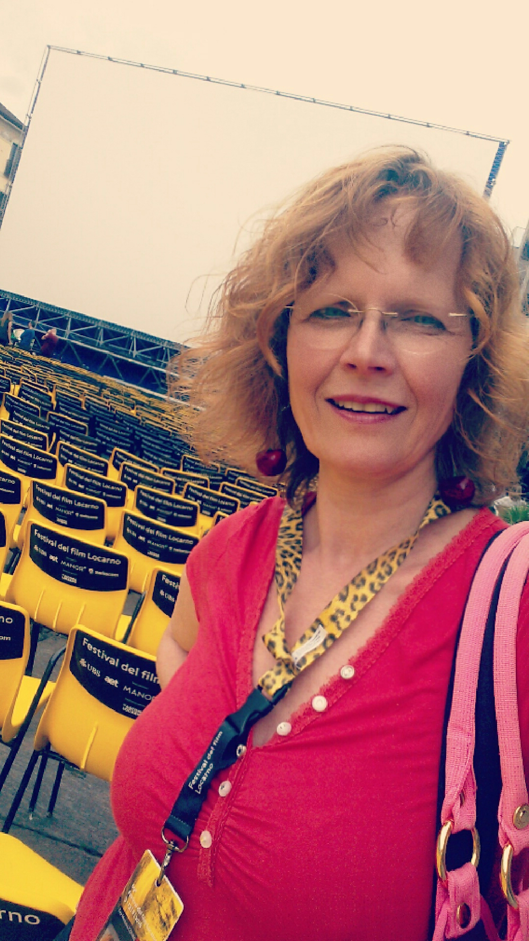 Eva Medusa Gühne, Internationales Filmfestival von Locarno, August 2016